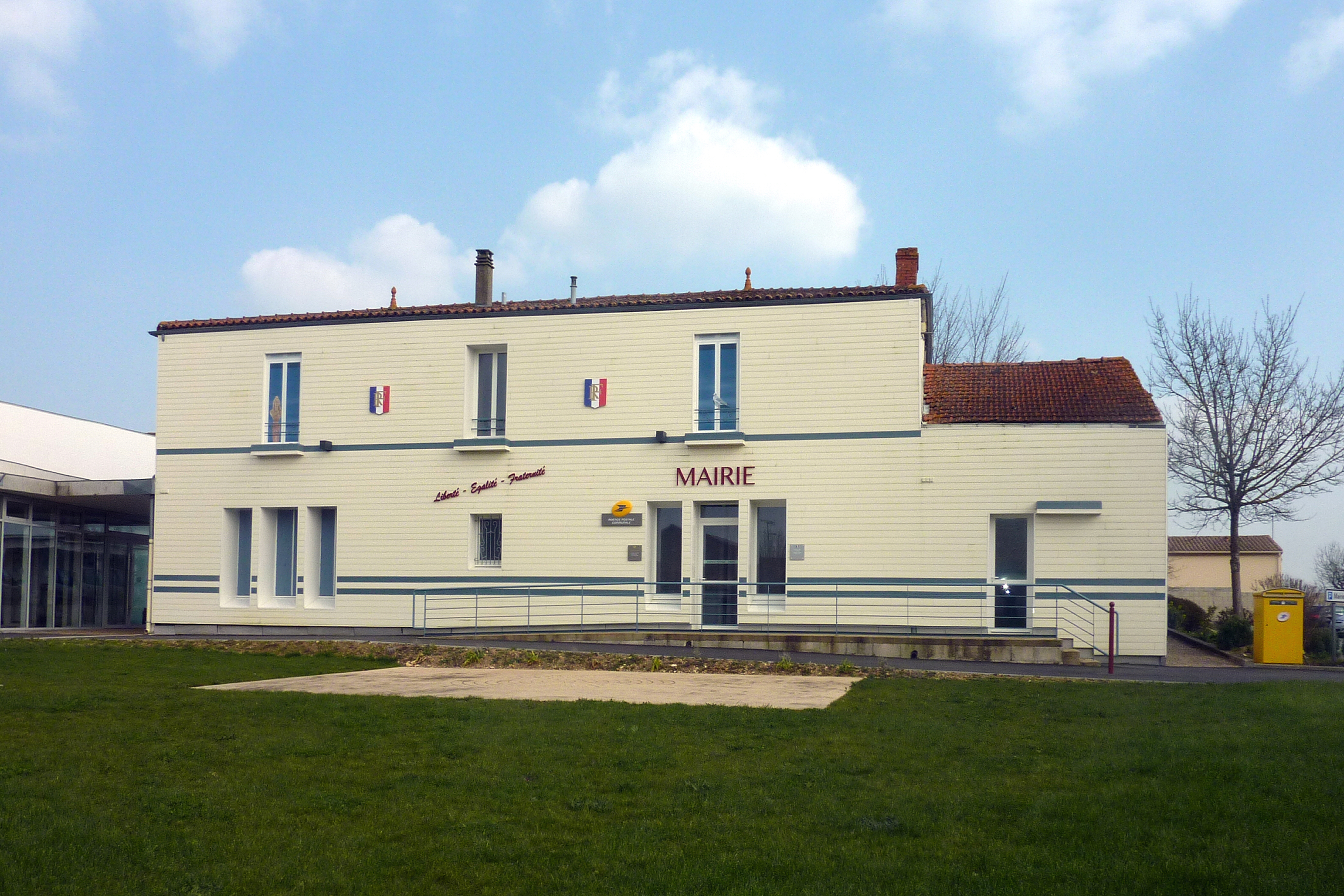 Mairie Landrais Charente-Maritime France